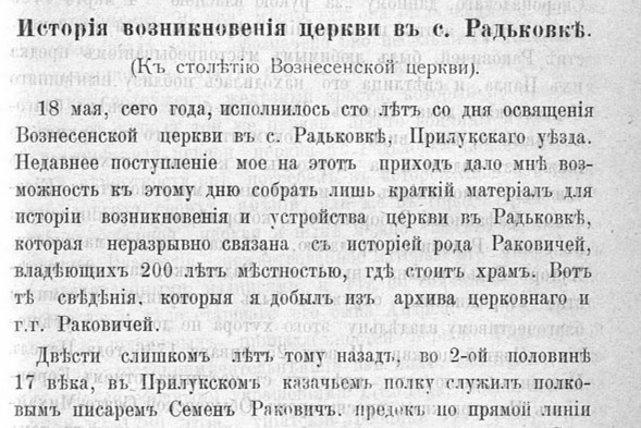 Зображення першої сторінки